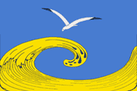 Флаг Глафировского сельского поселения, Краснодарский край, Россия.